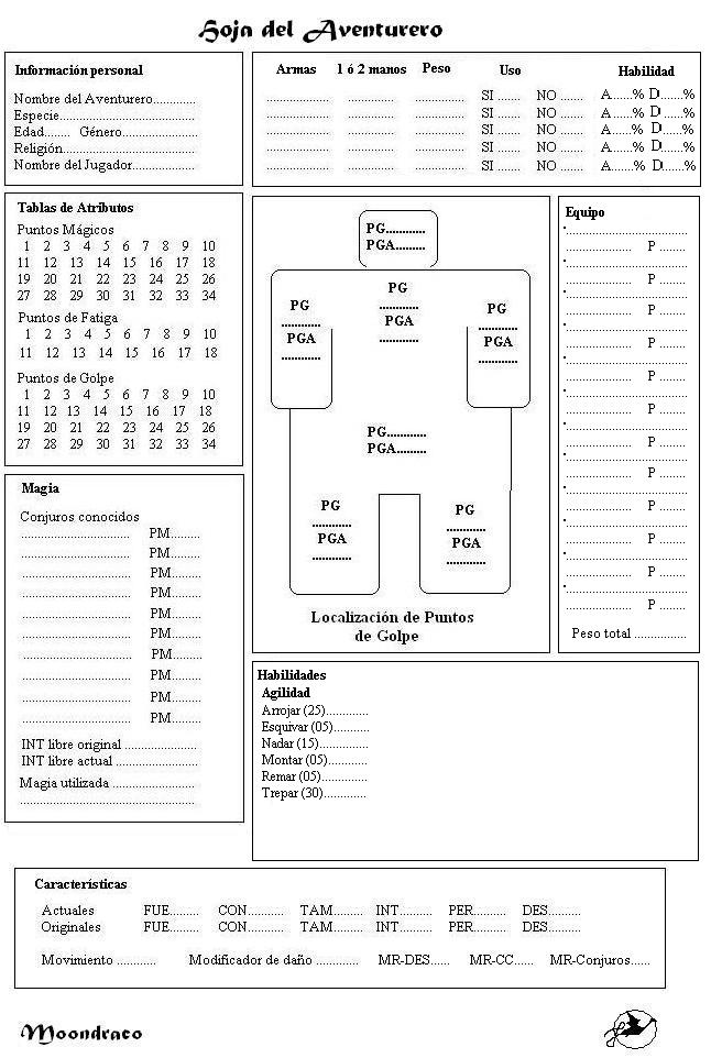 Una hoja de Aventurero para usar en juegos de rol